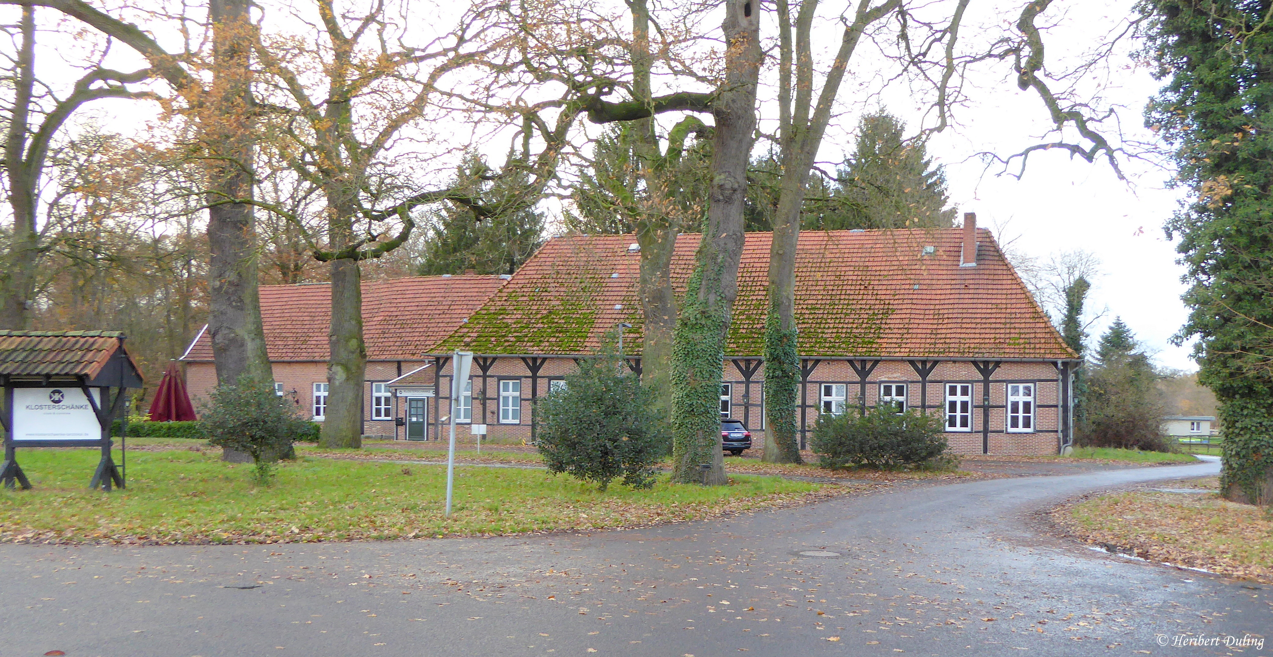 Klosterschänke (2017)